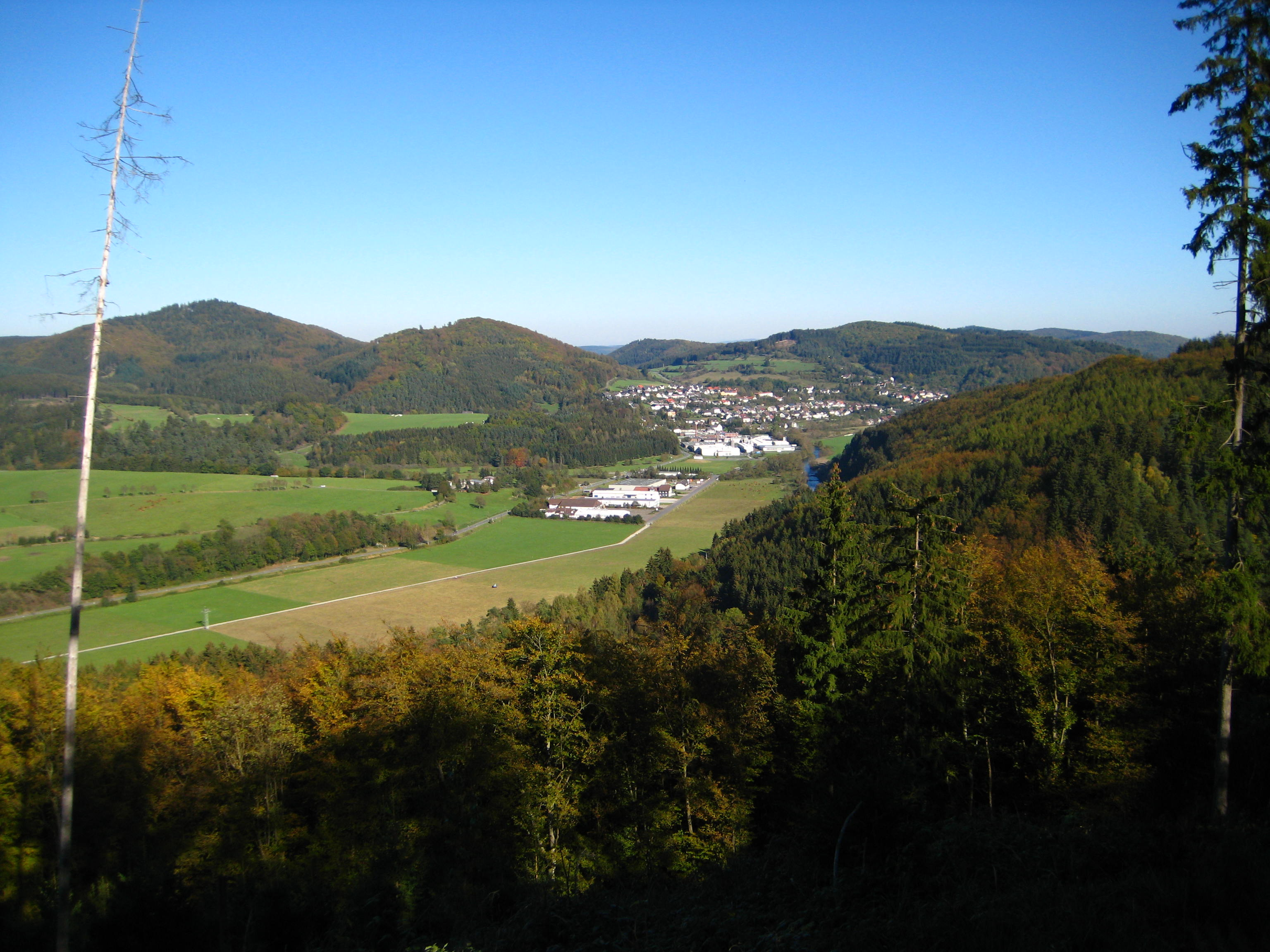 Blick vom Oscheid auf Hatzfeld